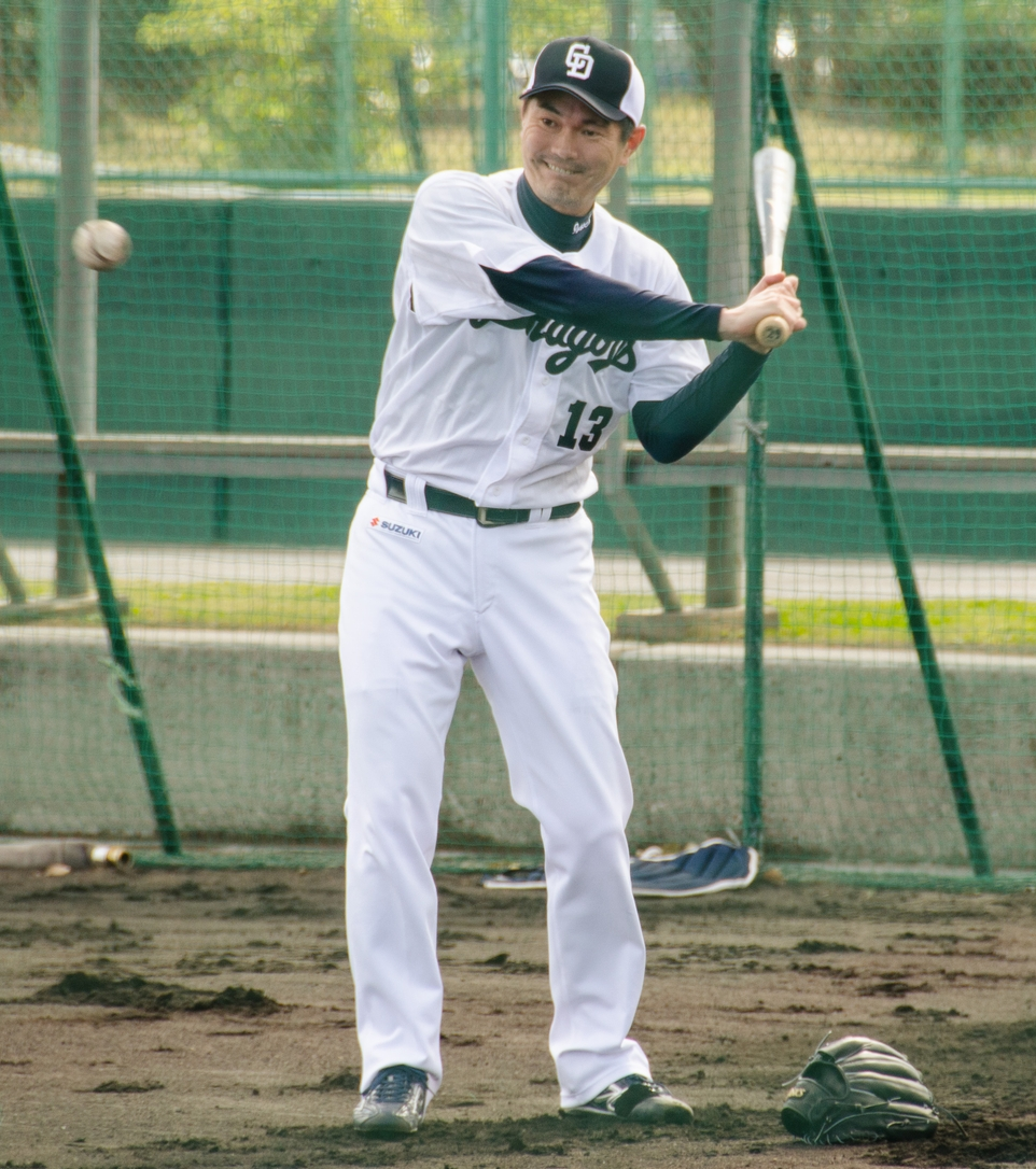 中日ドラゴンズ 岩瀬仁紀投手 2015年2月10日 沖縄・北谷にて